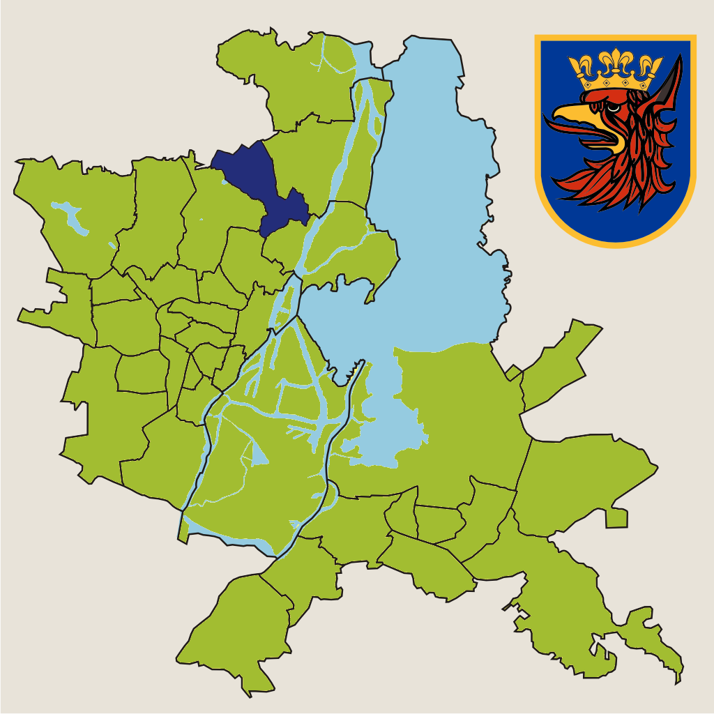 Osiedle "Bukowo" w Szczecinie – jednostka pomocnicza miasta w 2010